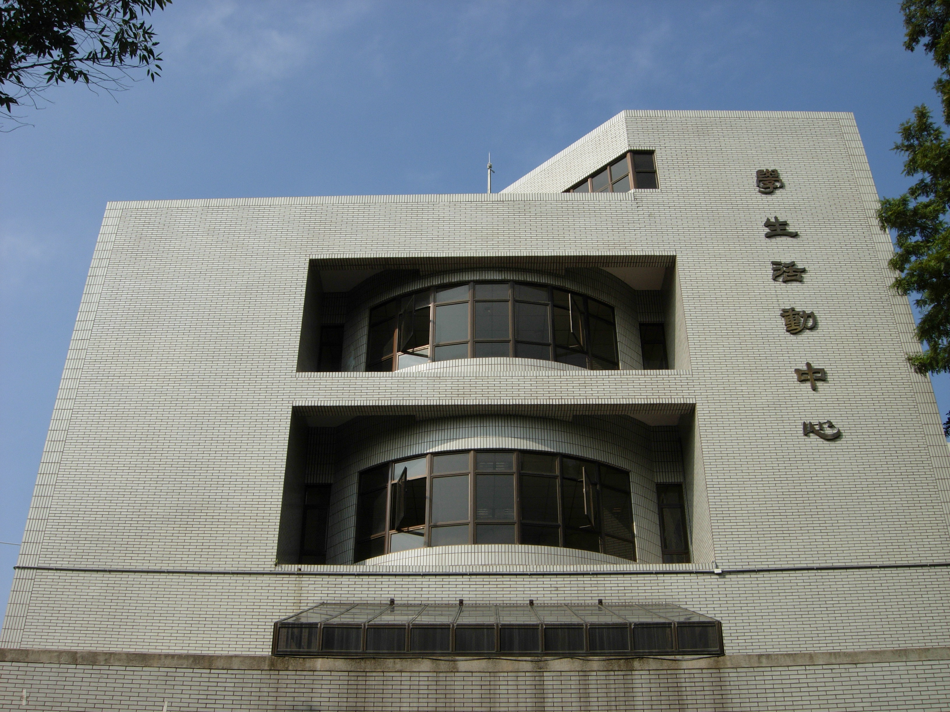 国立新竹教育大学学生活动中心